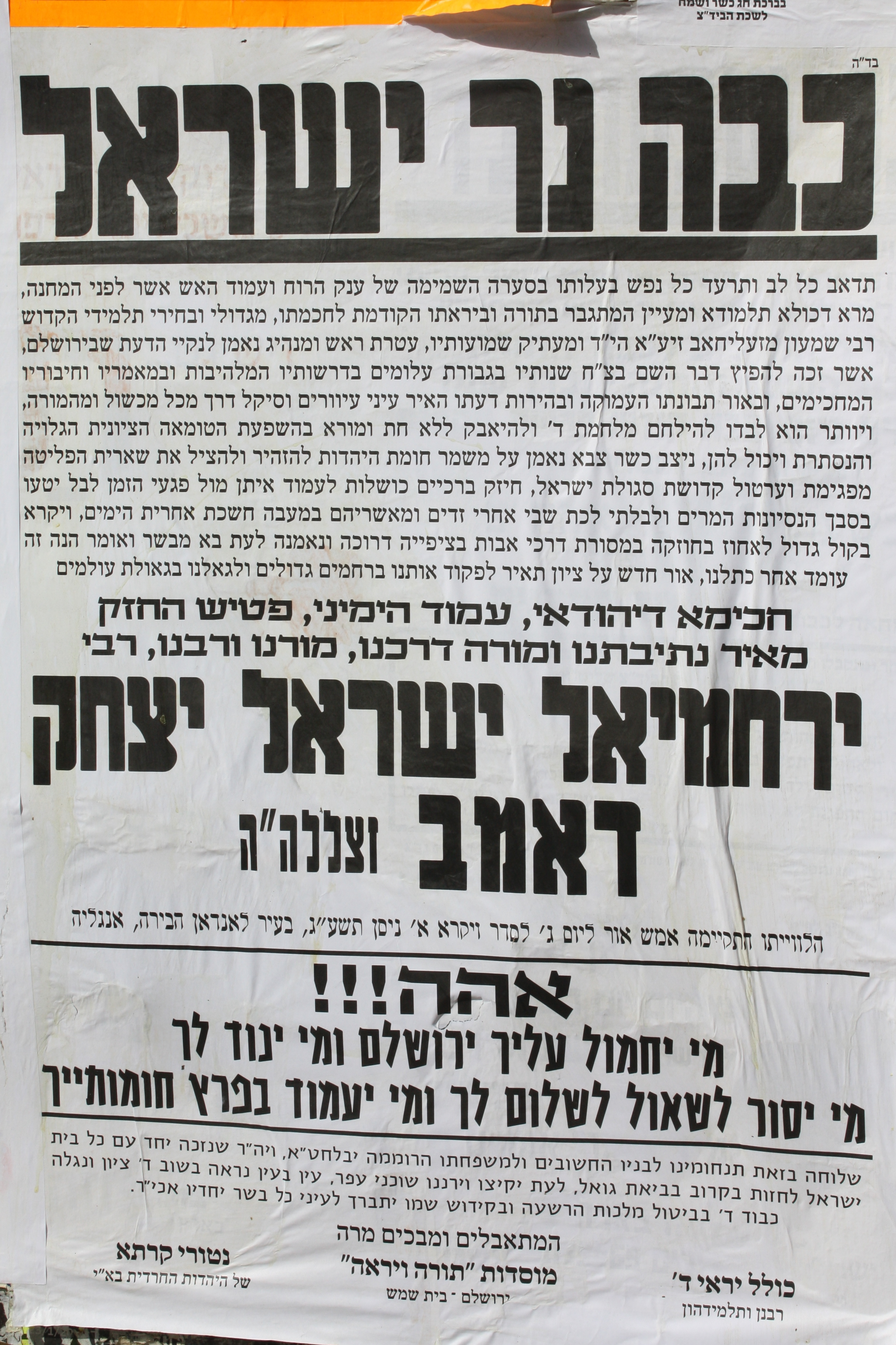 מודעת אבל על פטירת הרב ירחמיאל ישראל יצחק דומב